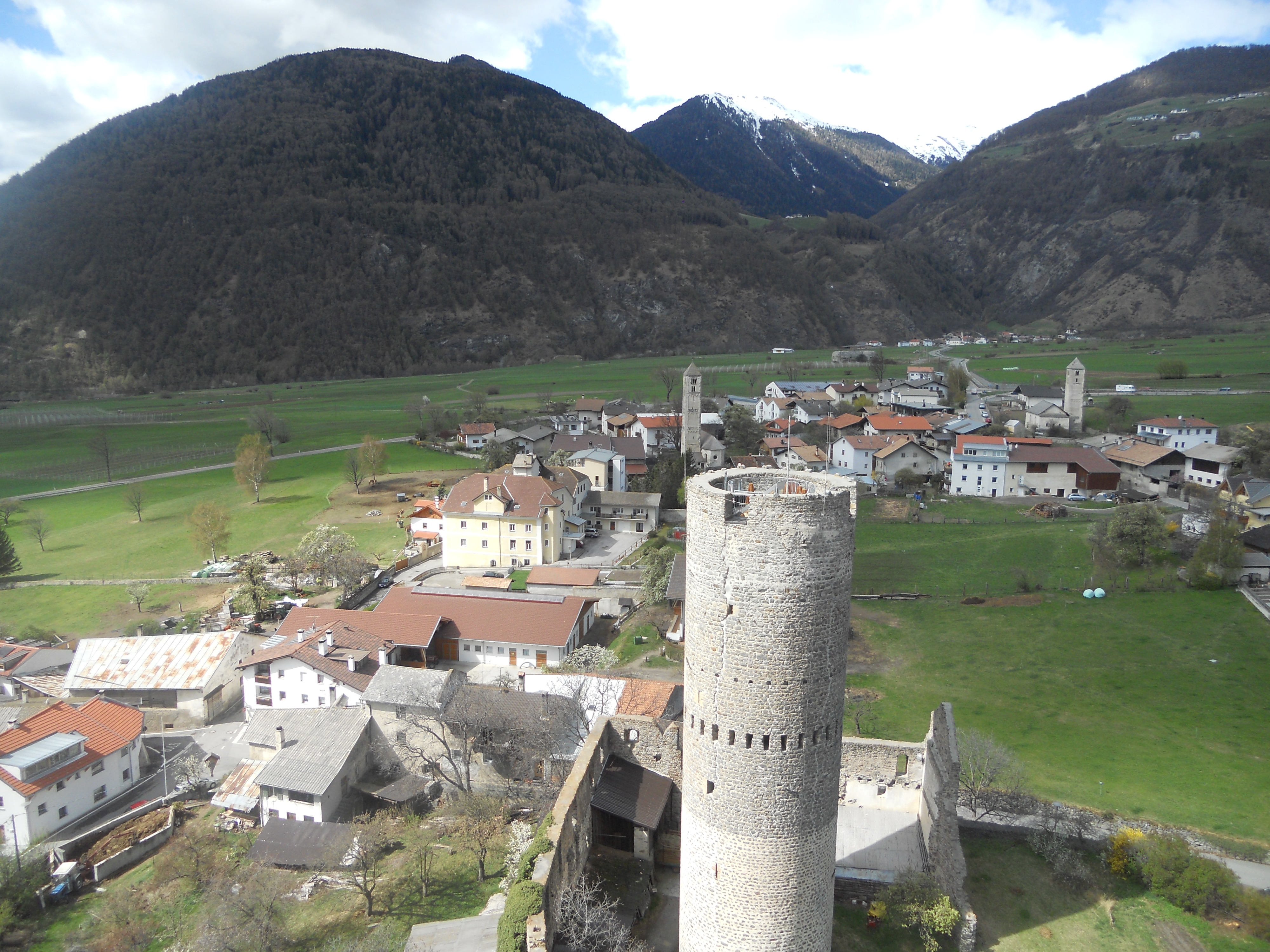 Turm der Ruine Fröhlichburg mit Ortsteil "Russland" im Hintergrund